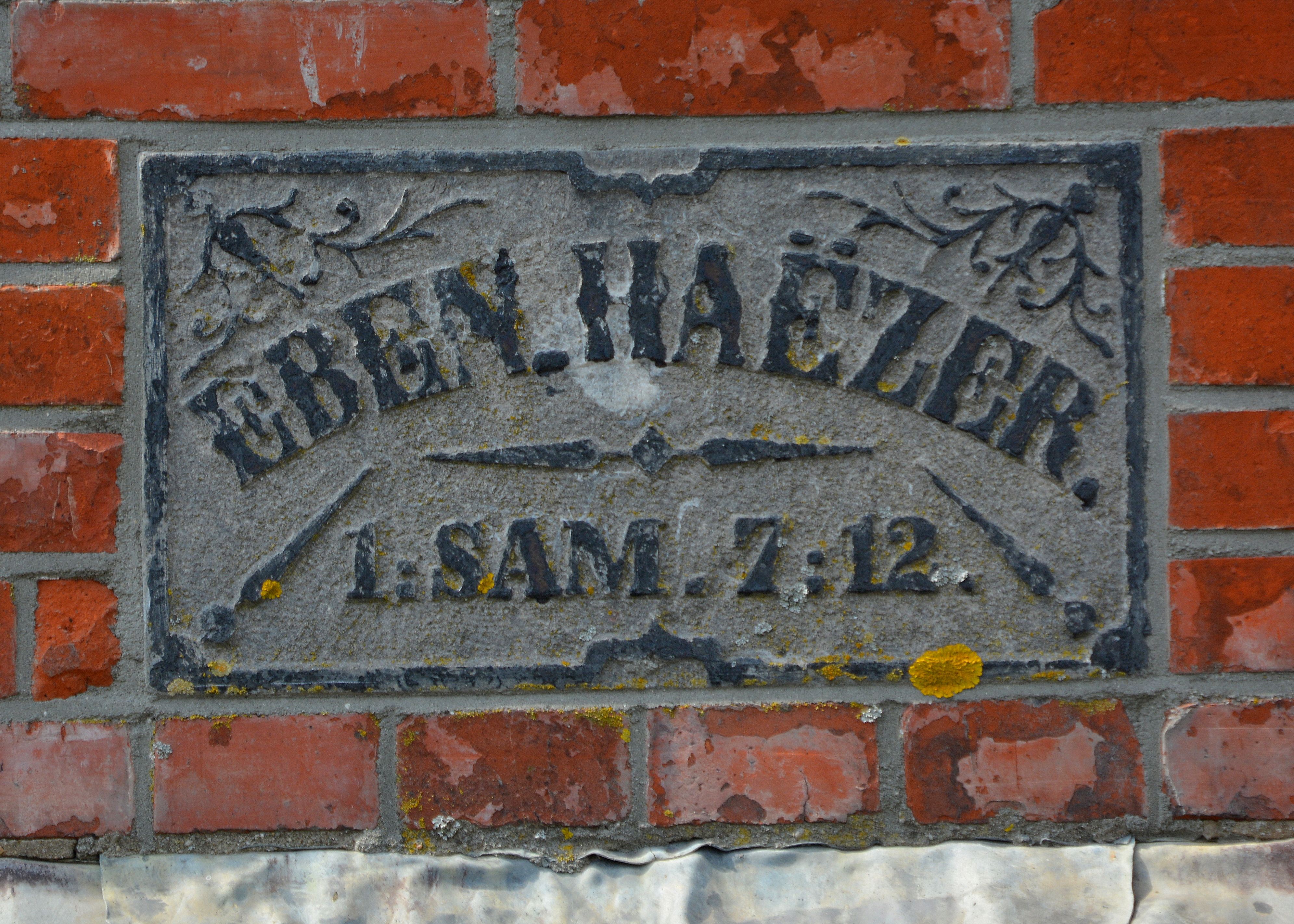 Earnewâld, grifformearde tsjerke Eben Haëzer (gevelstien)